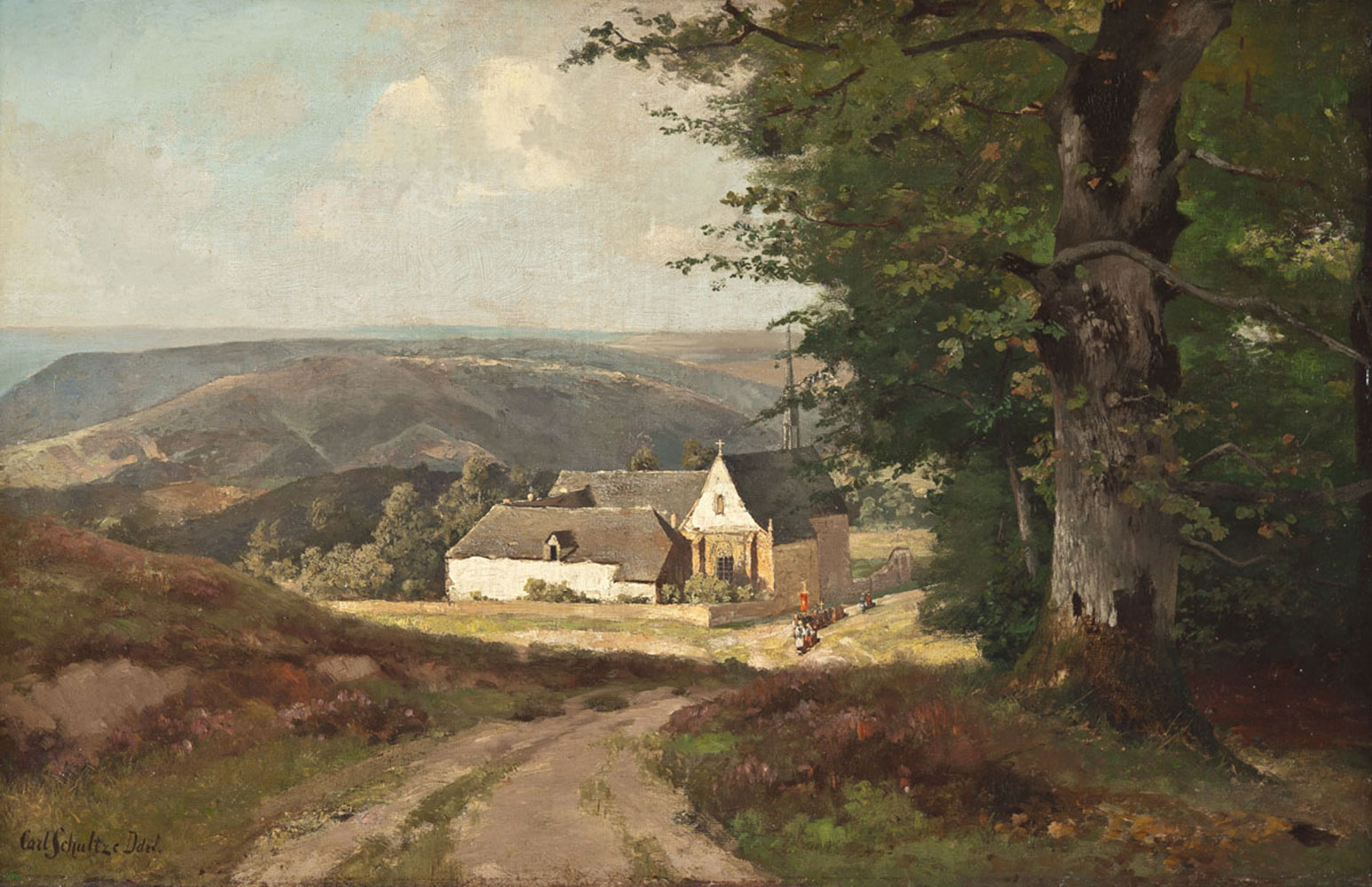 Das alte Kloster Mariawald bei Heimbach i.d. Eifel, Öl auf Leinwand, 48 cm x 75 cm, unten links signiert und ortsbezeichnet Carl Schultze Ddrf., verso handschriftlich betitelt